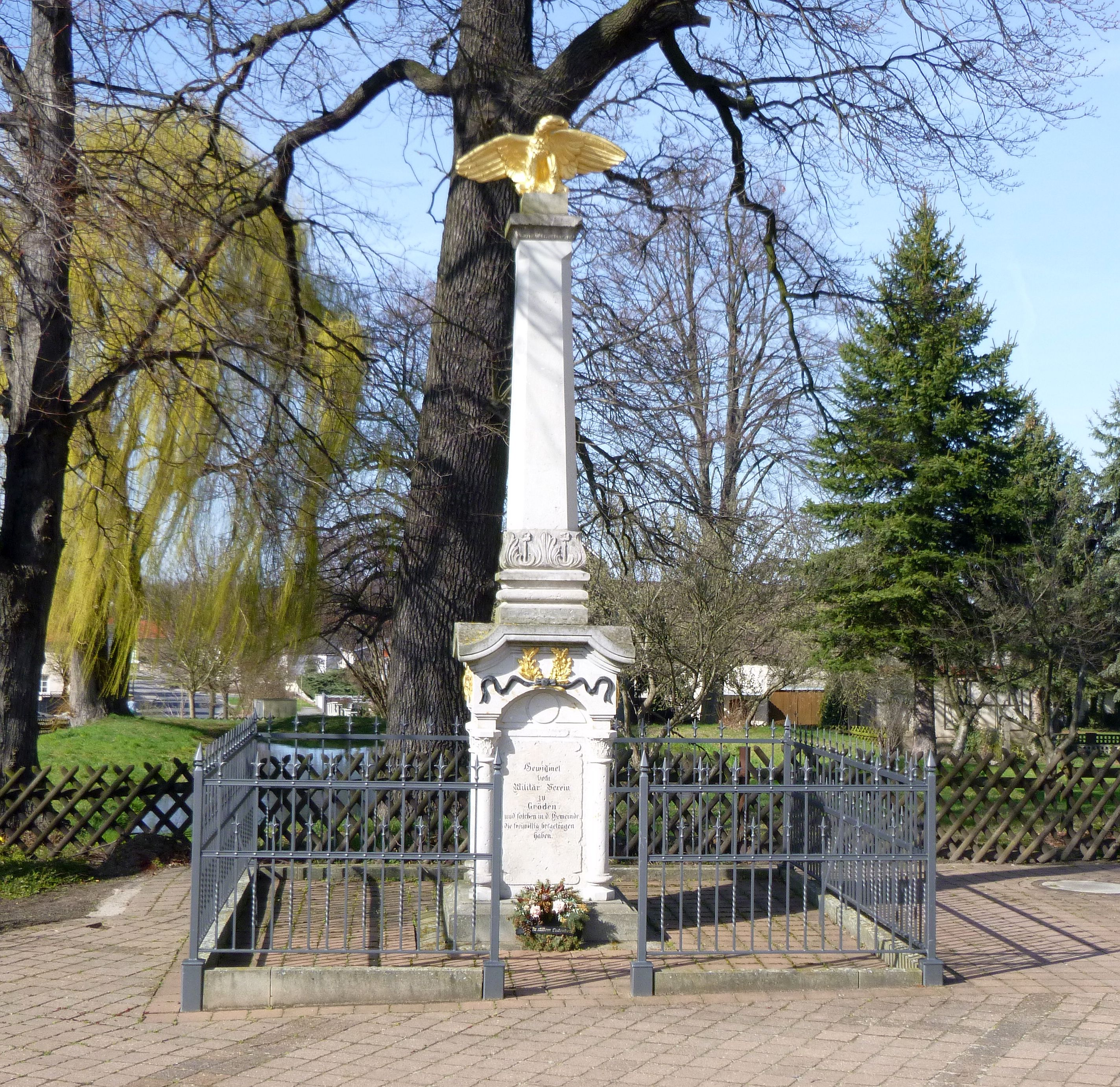 Kriegerdenkmal in Gröden (Brandenburg)